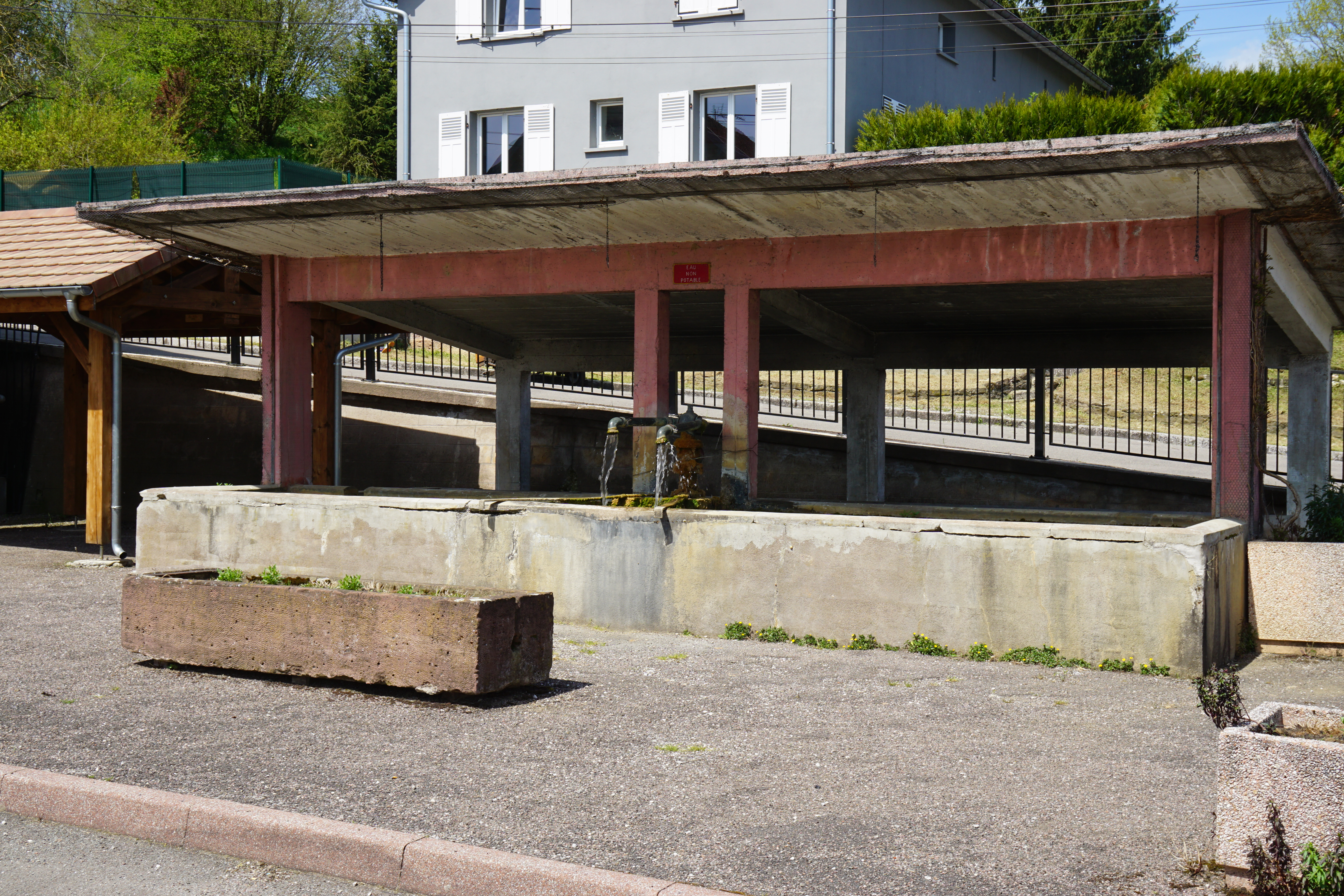 Fontaine à Secenans.